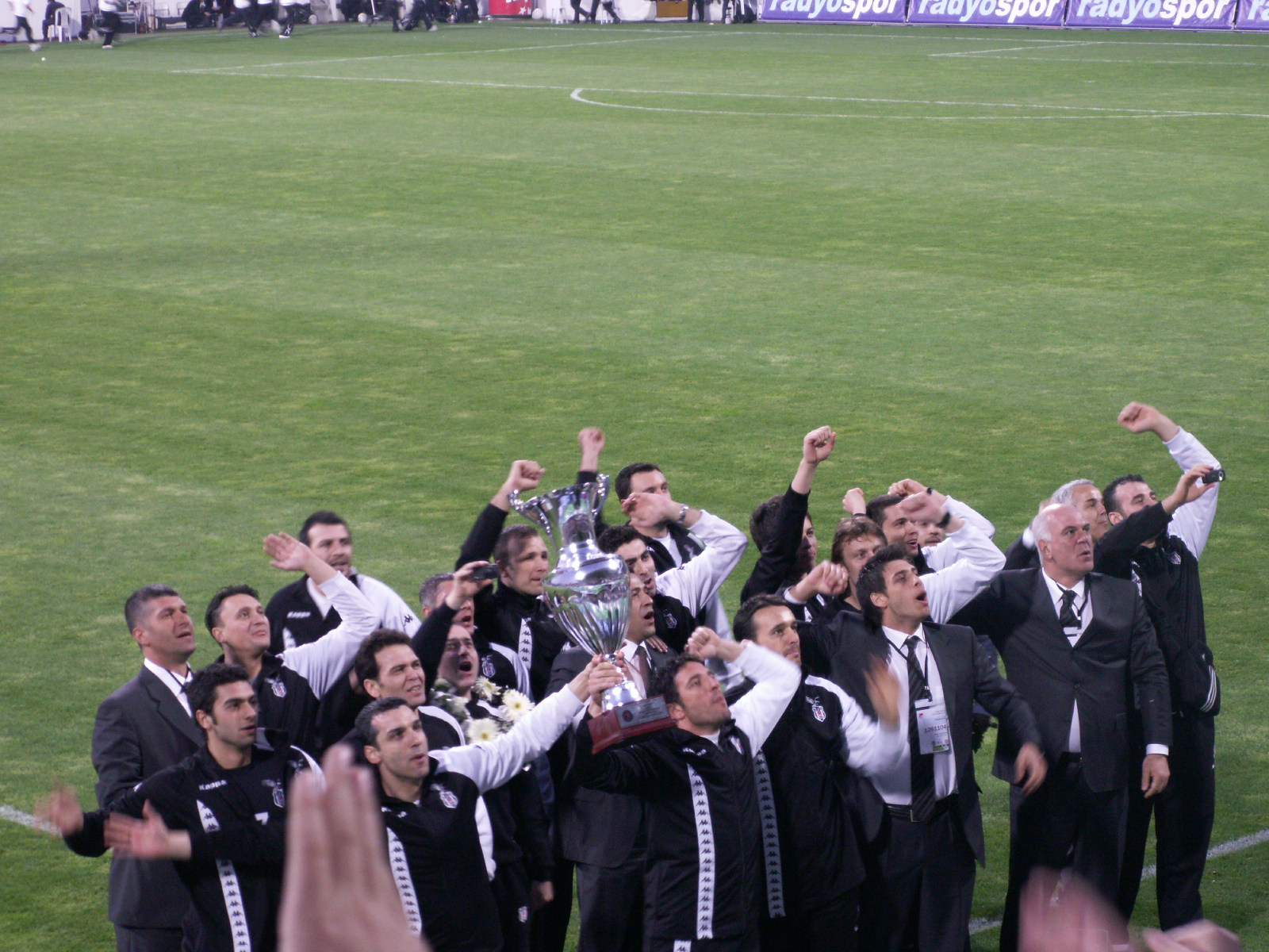 Besiktas defenders at BJK İnönü Stadyum